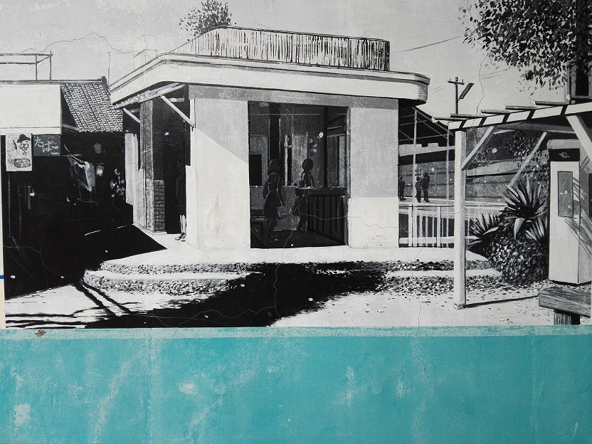 The painting of Shin-Suma Station at Midori interchange